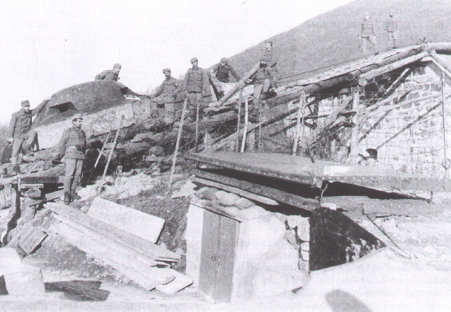 il forte austriaco Colle delle benne 1915